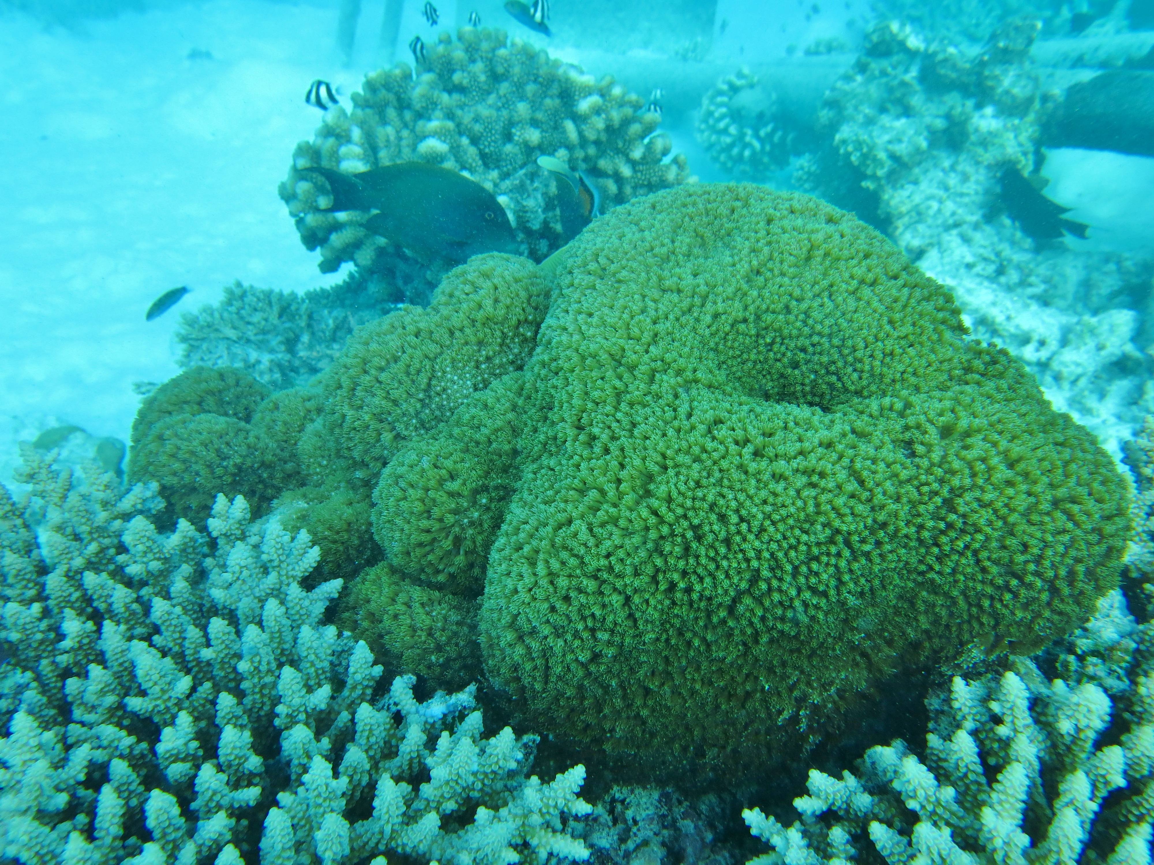 Une colonie de corail Goniopora aux Maldives (Landaagiraavaru, atoll de Baa).